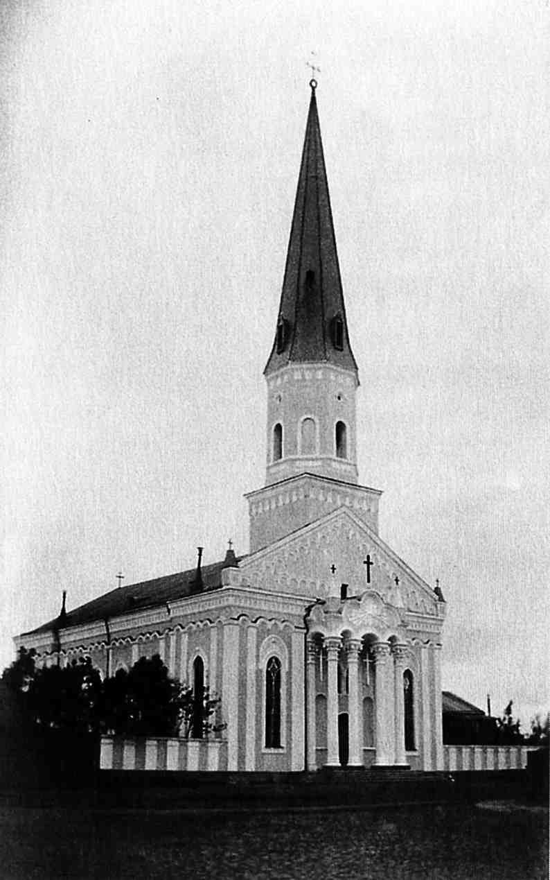 Кирха святого Николая в Кронштадте.